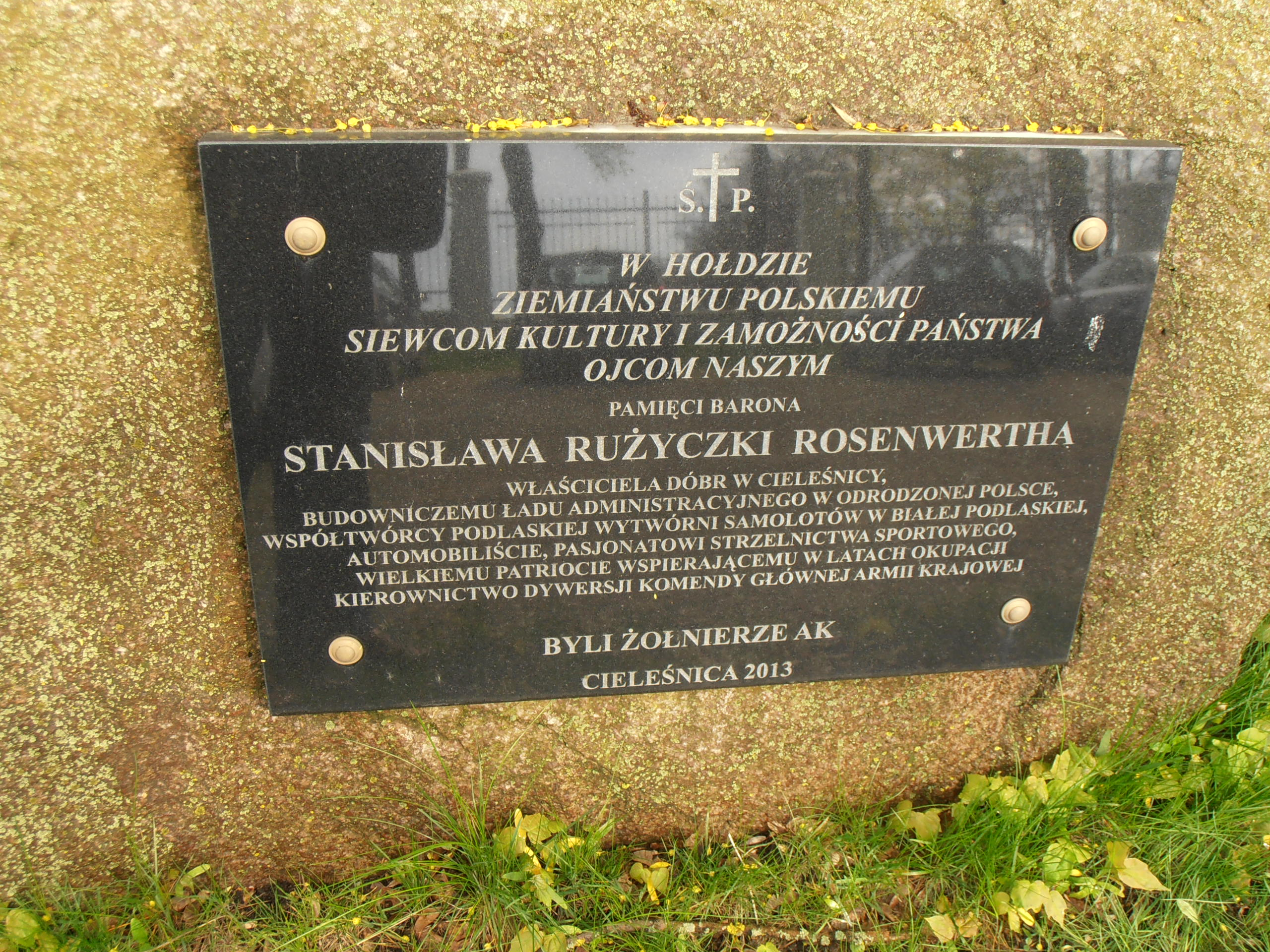 Cieleśnica (pow. bialski, woj. lubelskie, Polska). Tablica pamiątkowa poświęcona Stanisławowi Różyczce de Rosenwerth.